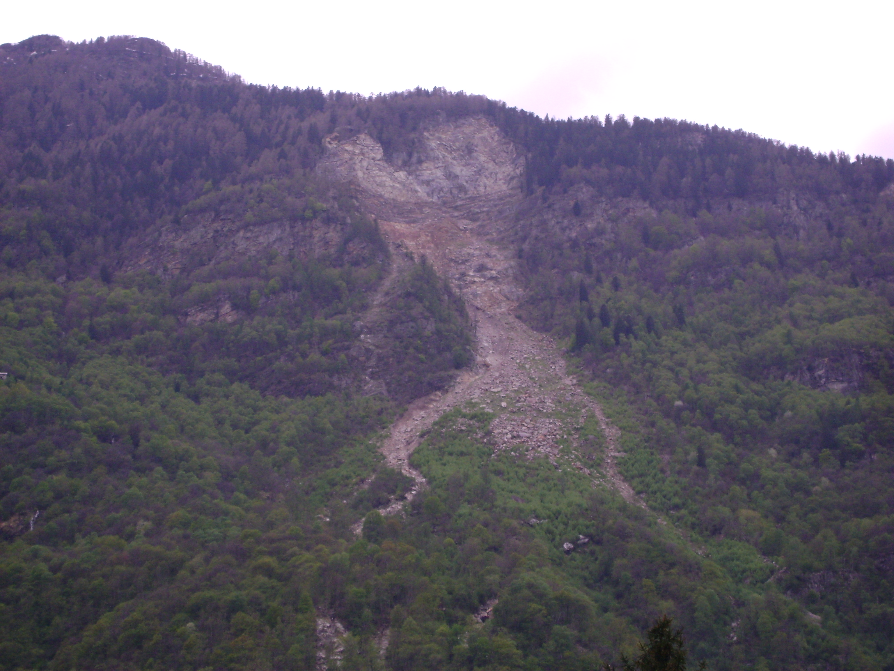 Frana del Valegion nel 2010